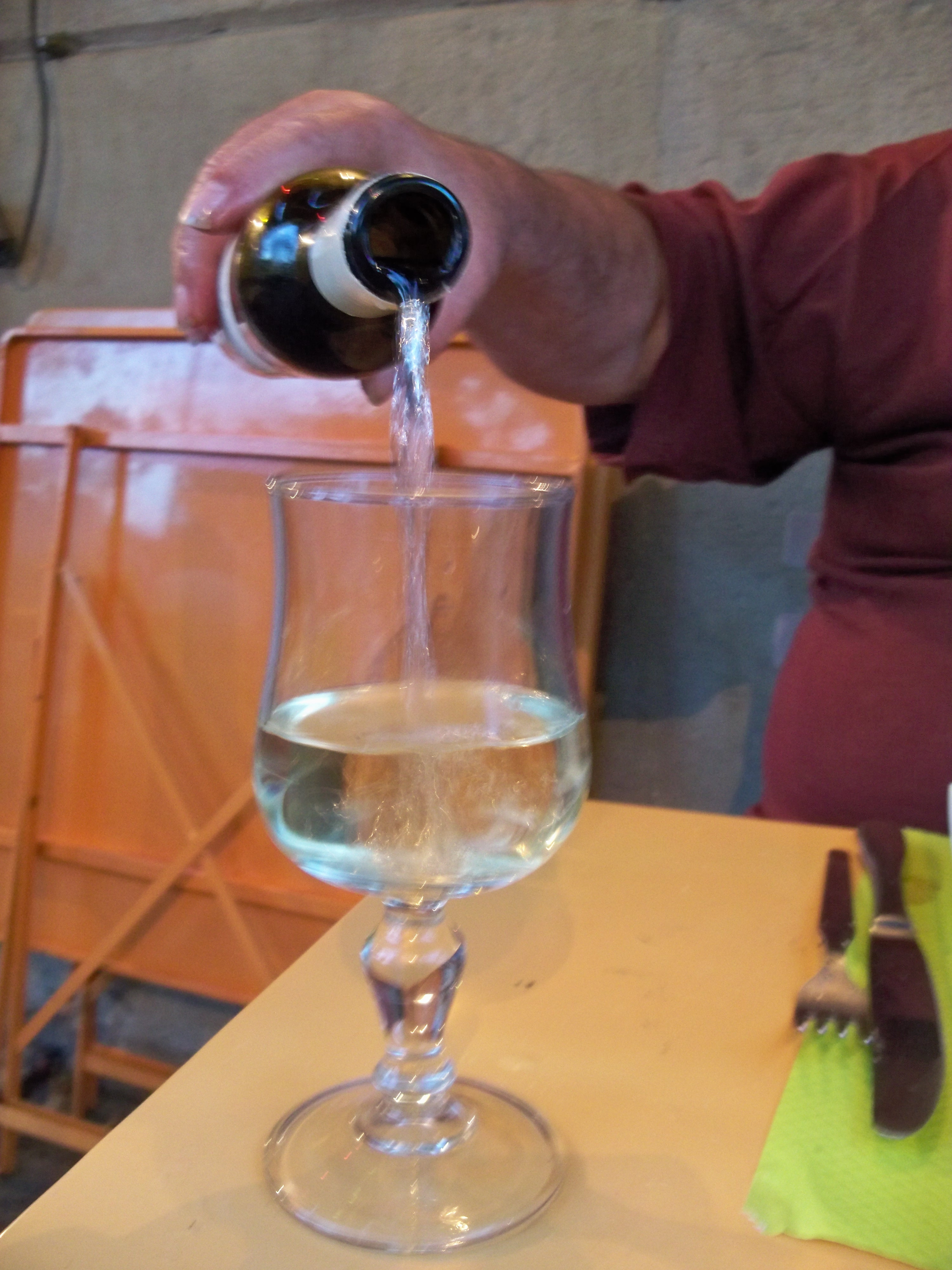 service du vin d'Allobroges IGP blanc